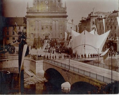 Slavnost pred odkritjem Prešernovega spomenika na Marijinem trgu leta 1905.